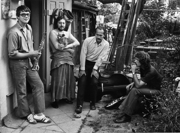 Skupina Ch.A.S.A. v roce 1974